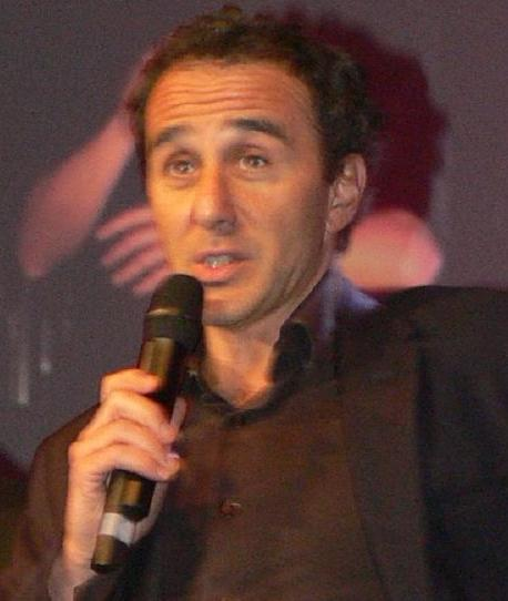 Elie Semoun